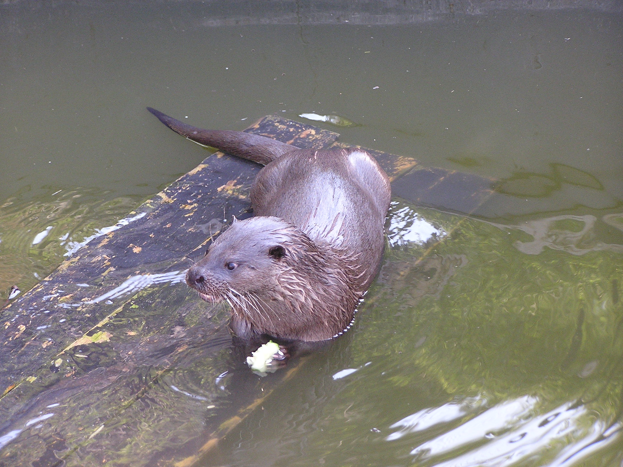 Ялтинский зоопарк. Выдра обыкновенная (Lutra lutra)